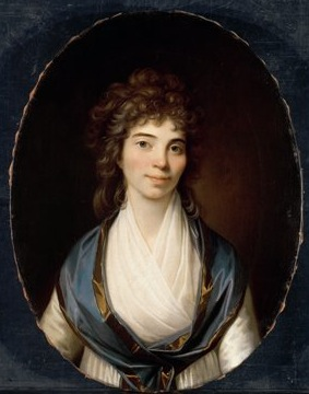 Norwegian: Anne Cathrine Arbo født Collett (1768-1846)